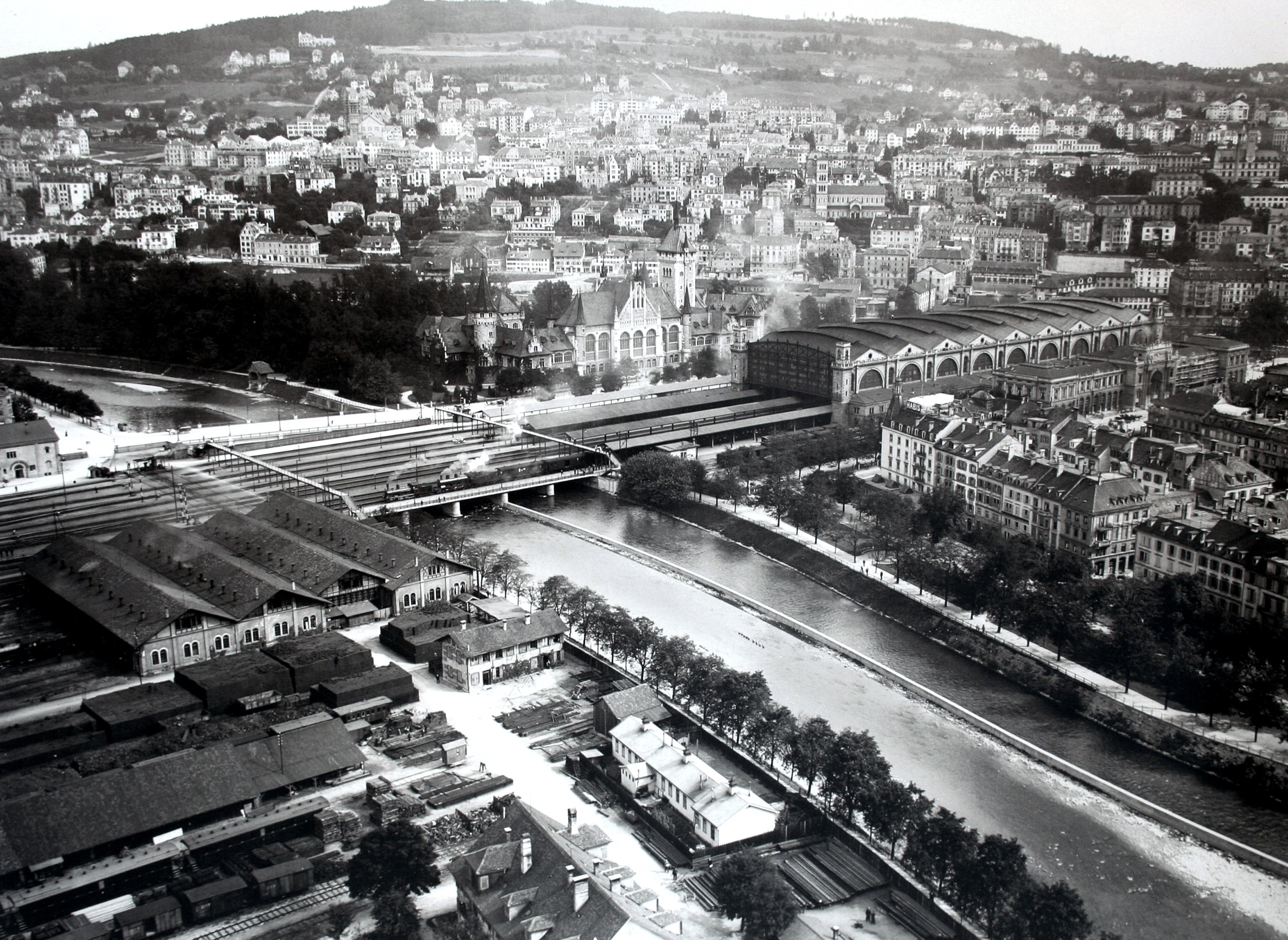 Zürcher Hauptbahnhof nach Südwesten, 1907: Bahnhof und Vorbahnhofgelände mit Lokomotiv-Remise